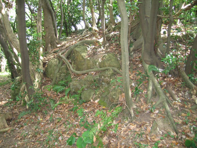 布勢天神山城の櫓台。戦国時代にはこの岩塊上に三重の天守がそびえていたとされる。